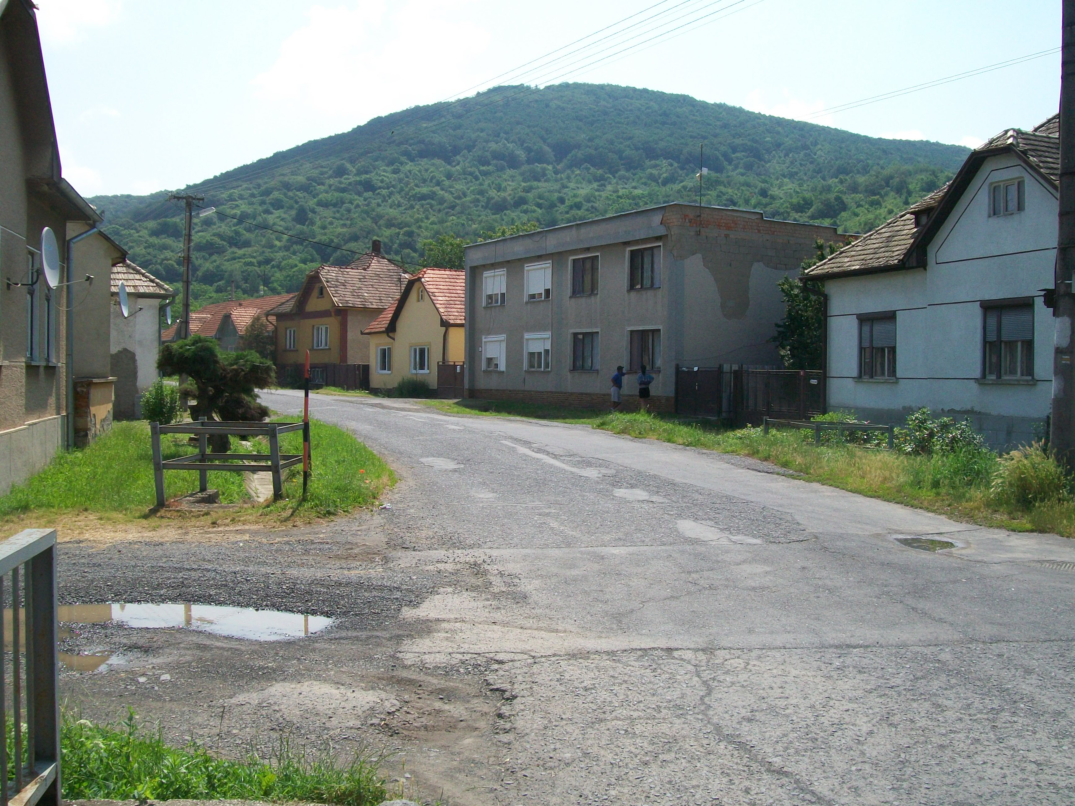 Ulica obce Belina (okr. Lučenec)